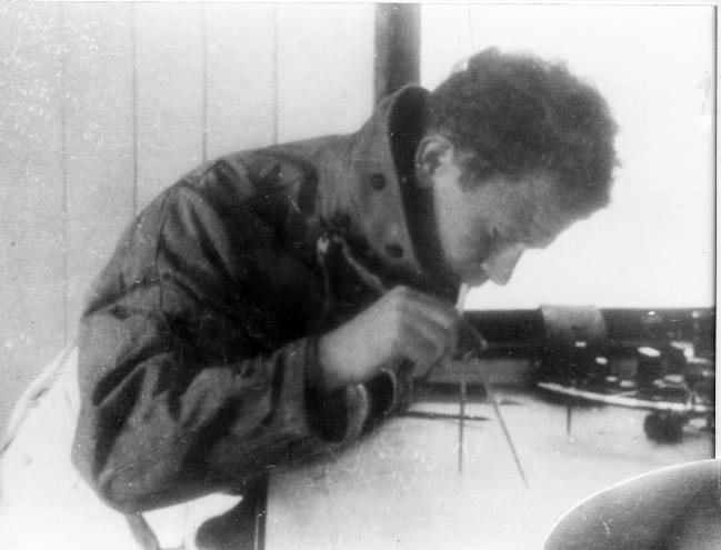 אוניית המעפילים אף על פי כן - על גשר הפיקוד